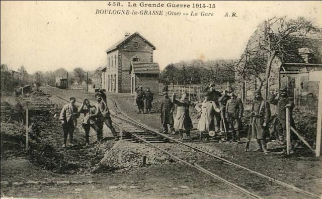 Carte postale de la gare vers 1920.